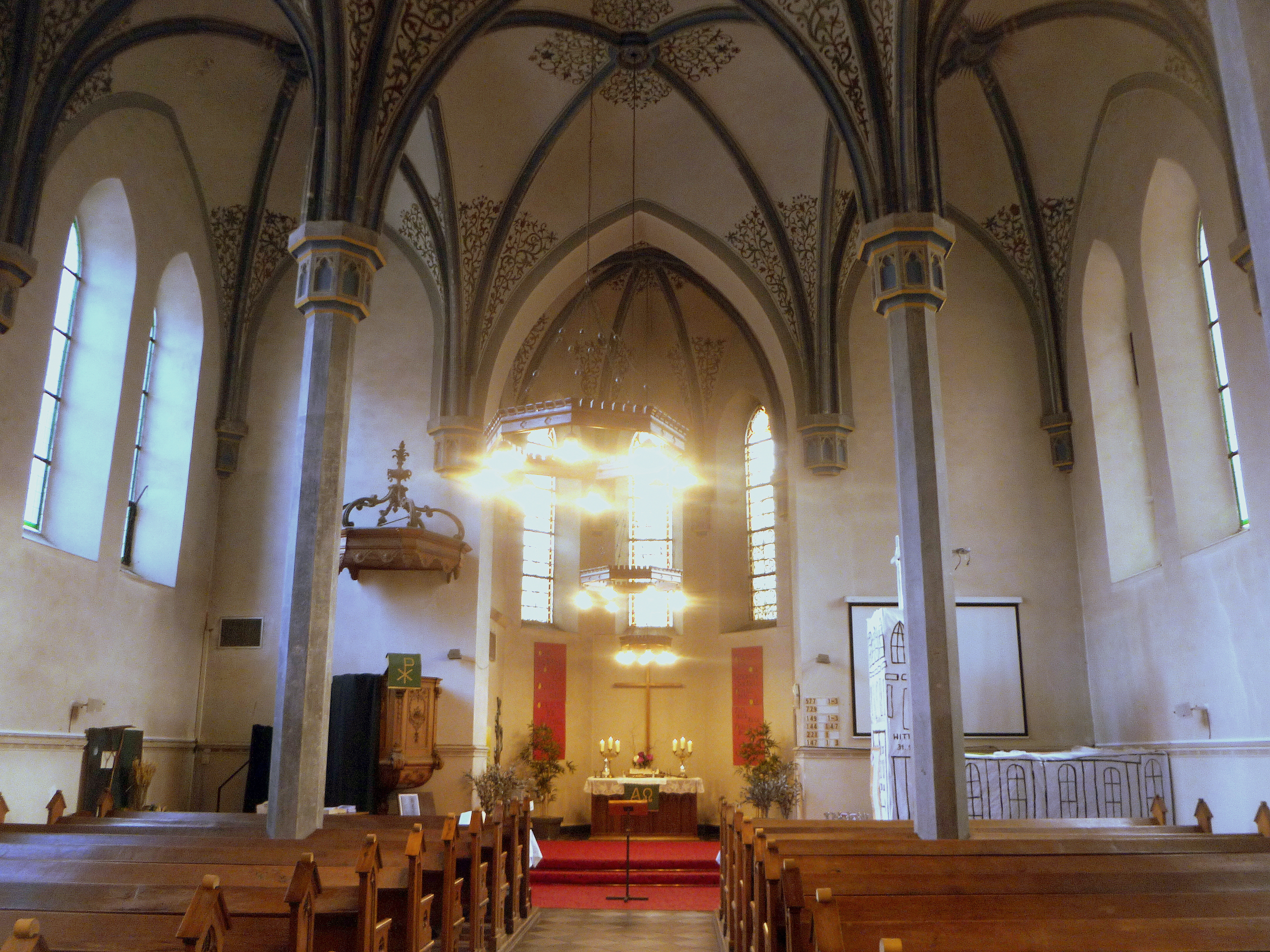 Innenraum Friedenskirche Eupen